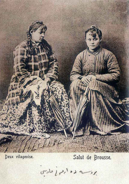 Bursalı kadınlar